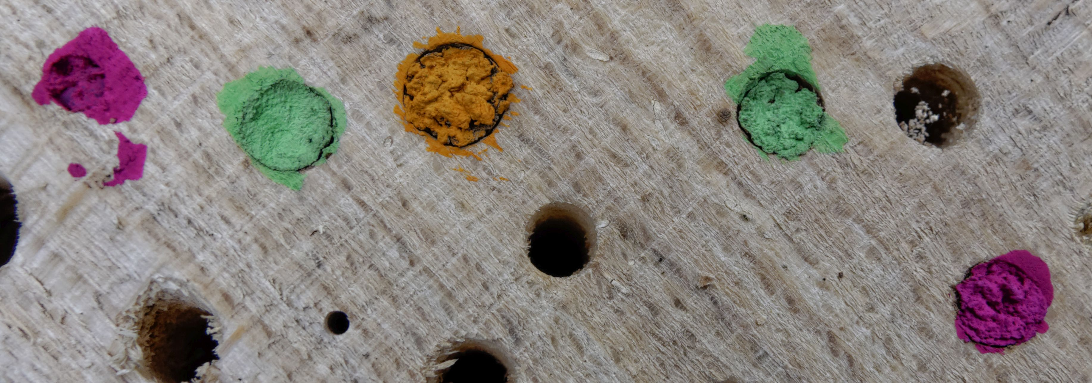 Bilder vom Insektenhotel